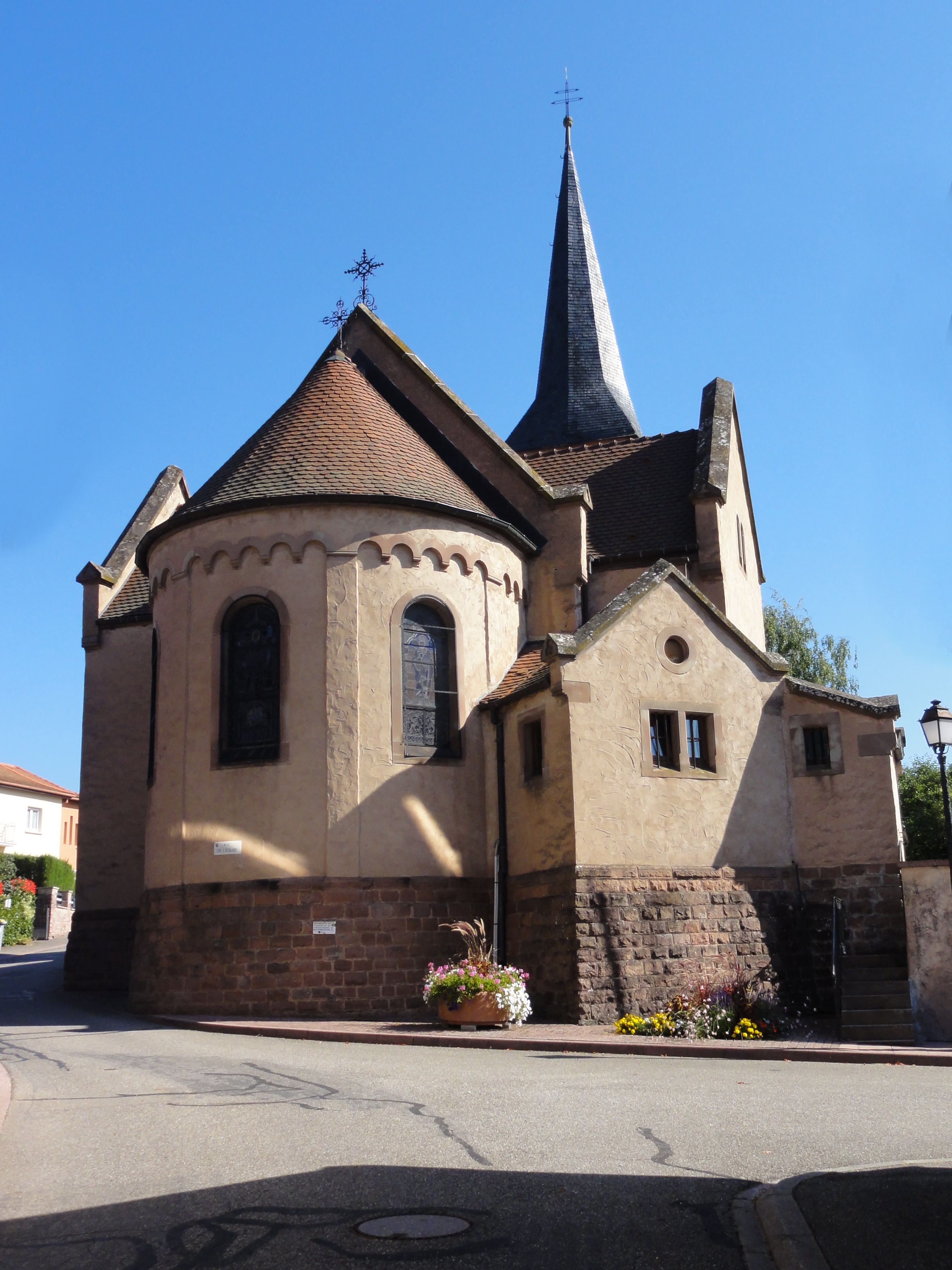 Alsace, Bas-Rhin, Saint-Maurice, Église Saint-Maurice (IA67009314).